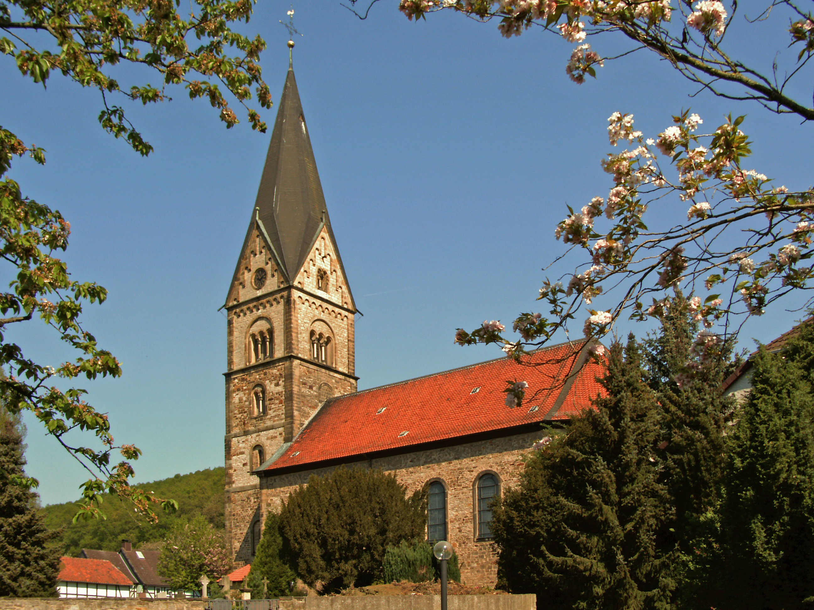 Katholische Kirche St. Gallus in Detfurth, Ortsteil von Bad Salzdetfurth